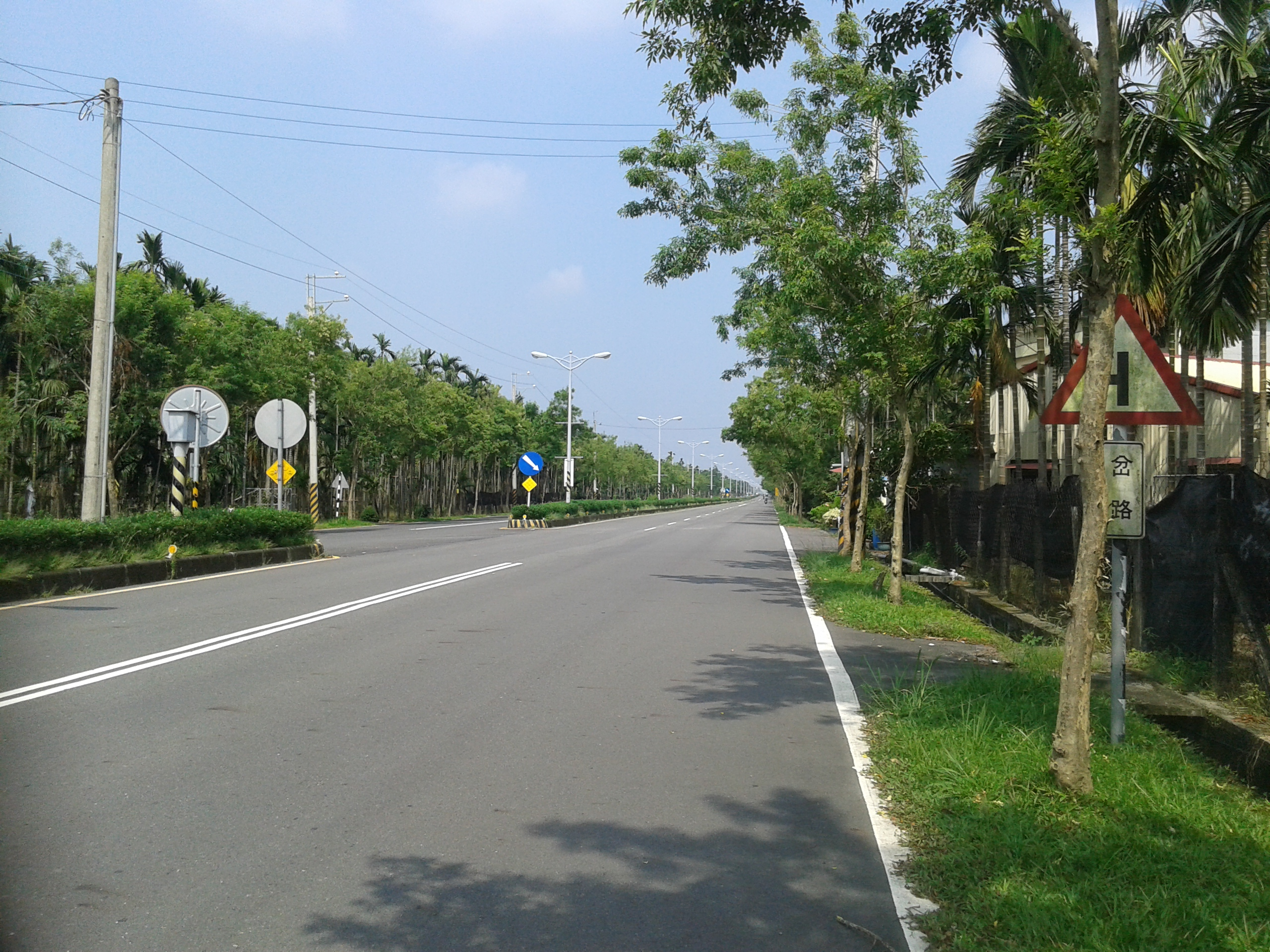 科大路 (縣道187丙線)